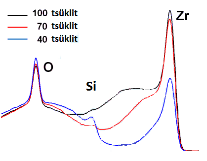 ALD meetodil valmistatud katte karakteriseerimine